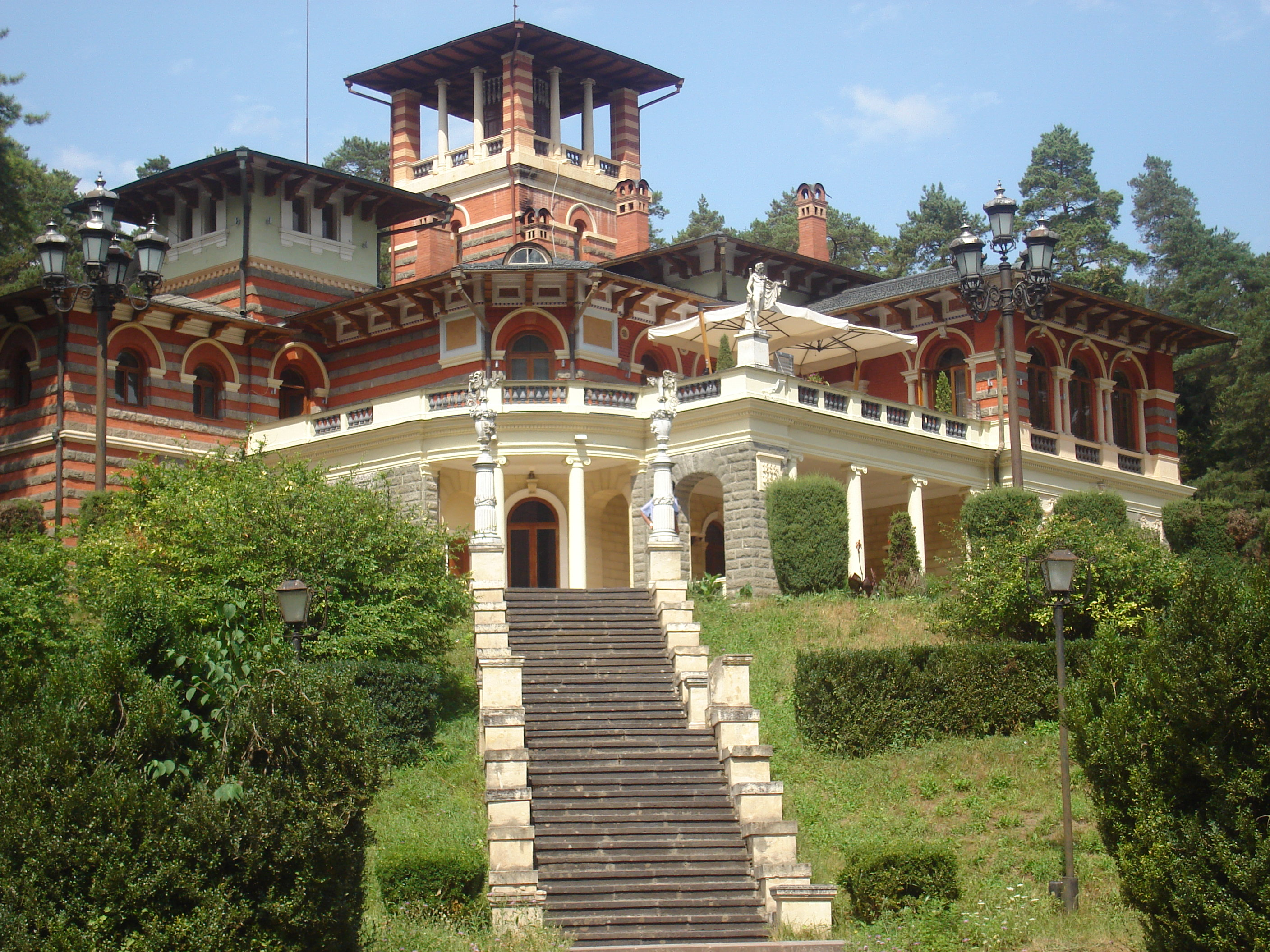 Likani Residence